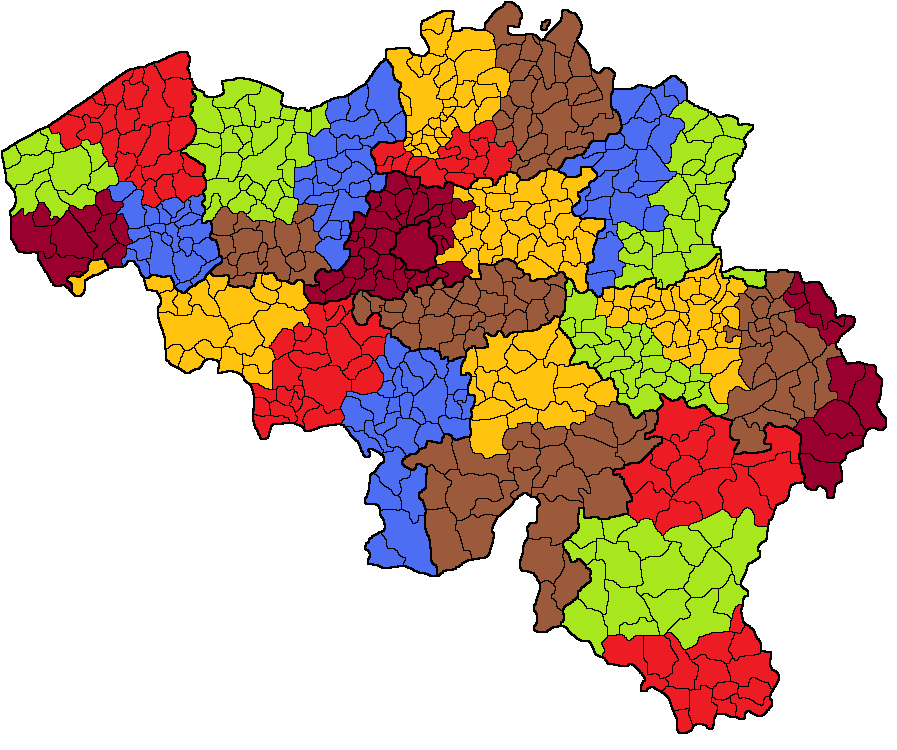 Kaart van België van de gerechtelijke arrondissementen.